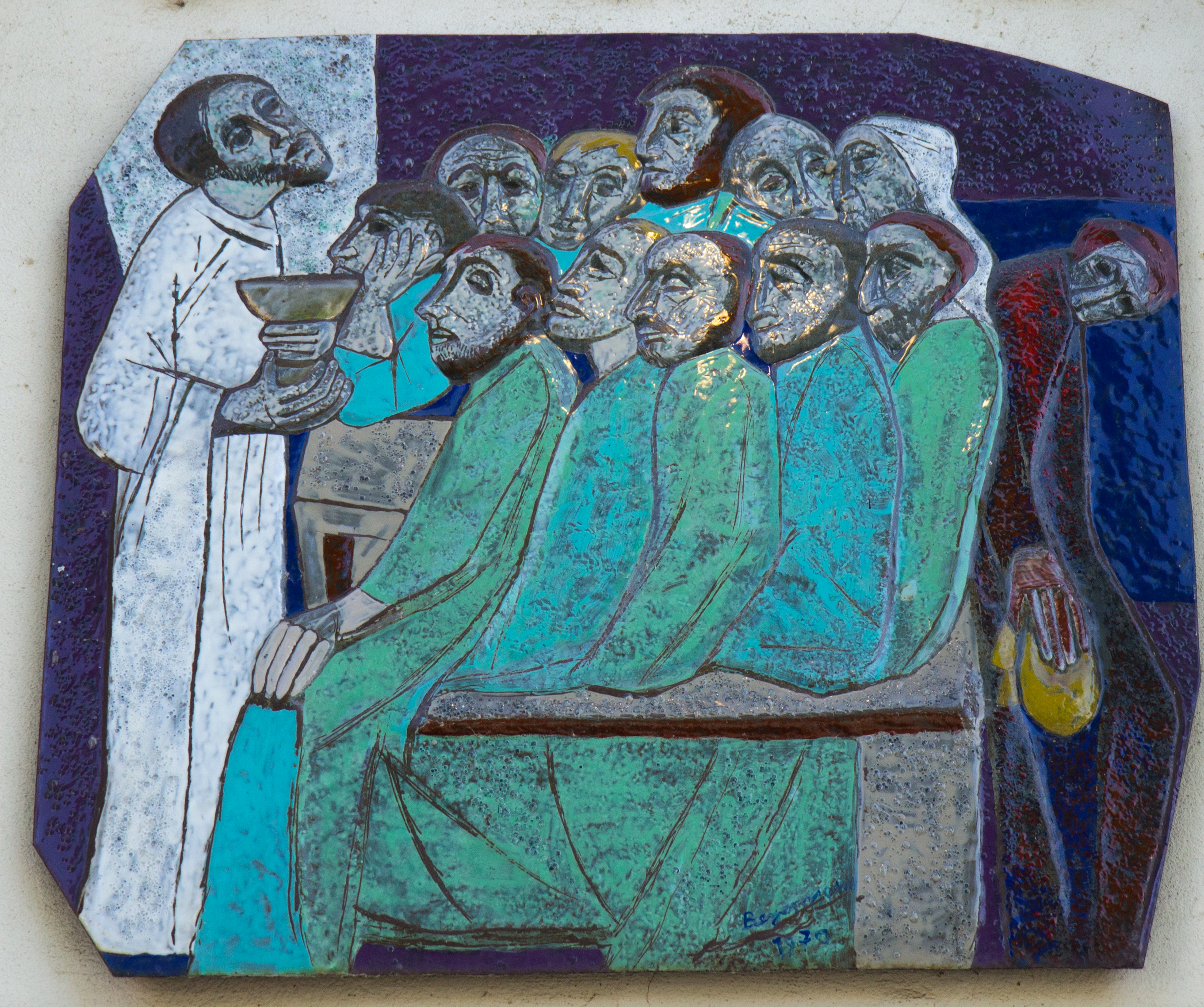 St. Bartholomäus (Ortenberg)